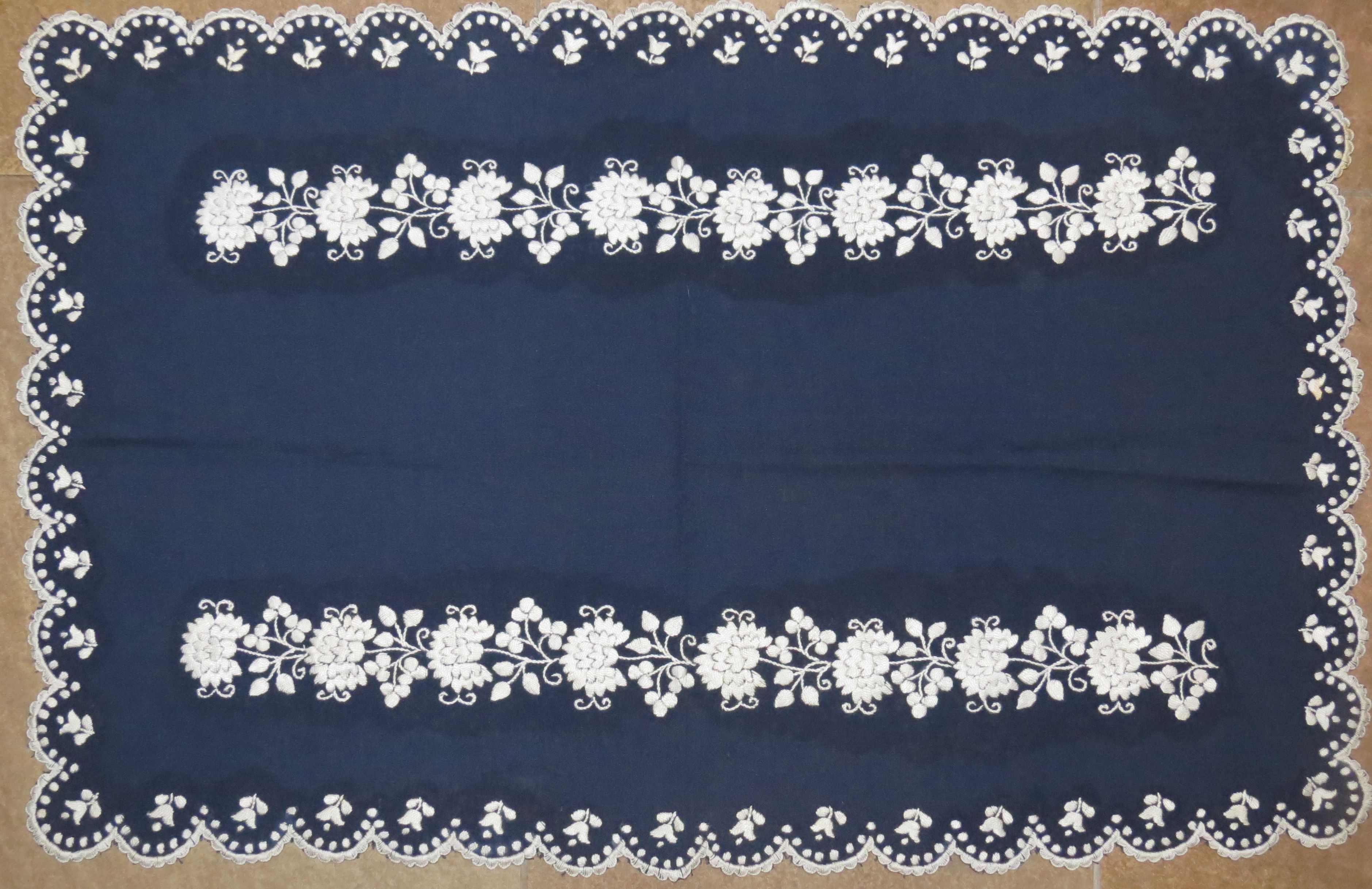 A furtai hímzés búzakék alapon fehér pamuttal.